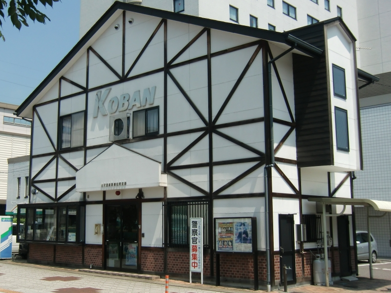 白河警察署新白河交番